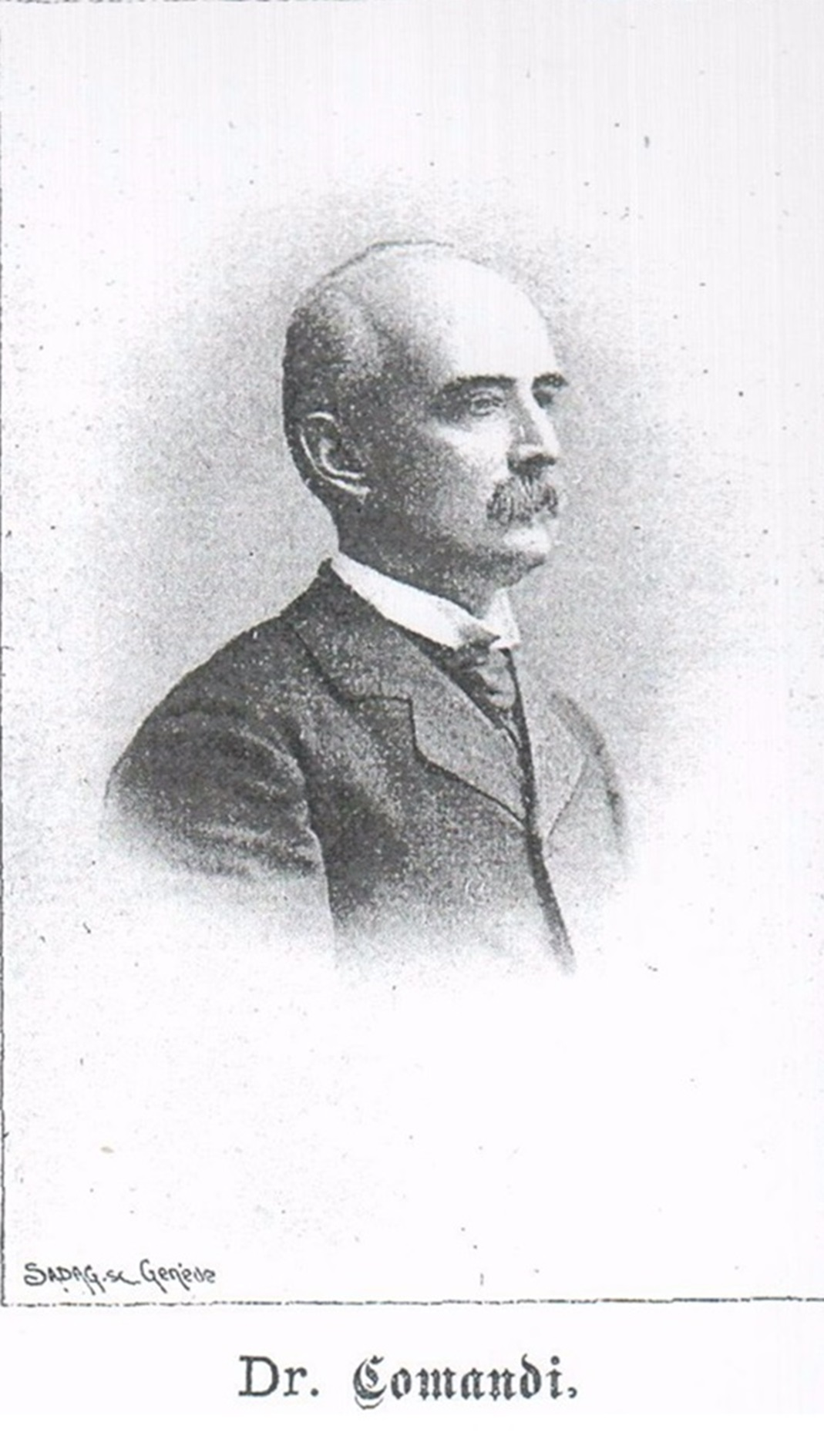 Bild aus Brosamen von Franz Eugen Schlachterr 1899 reproduziert